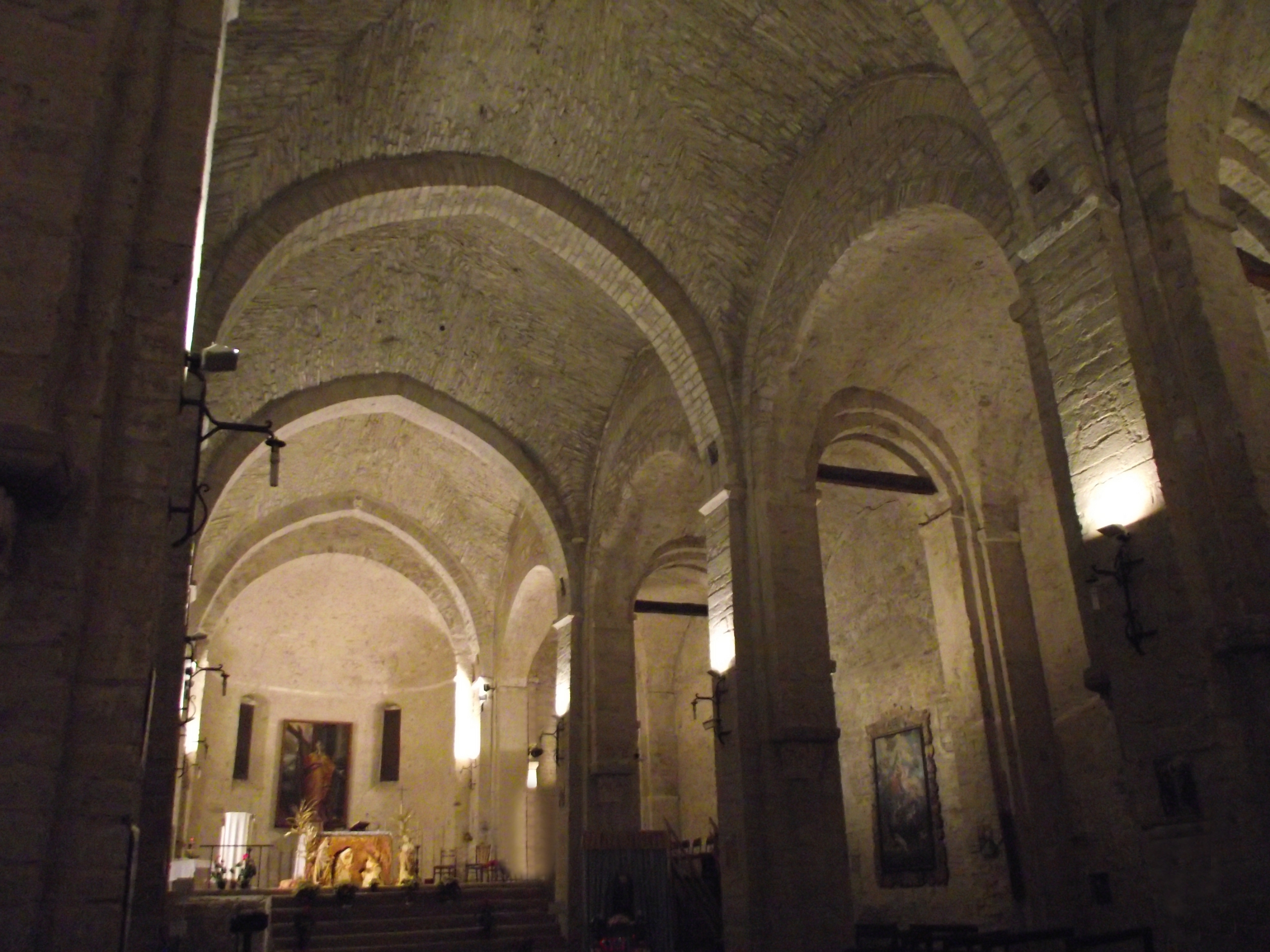 Serra San Quirico, Abbazia di Sant'Elena, 1180-1212